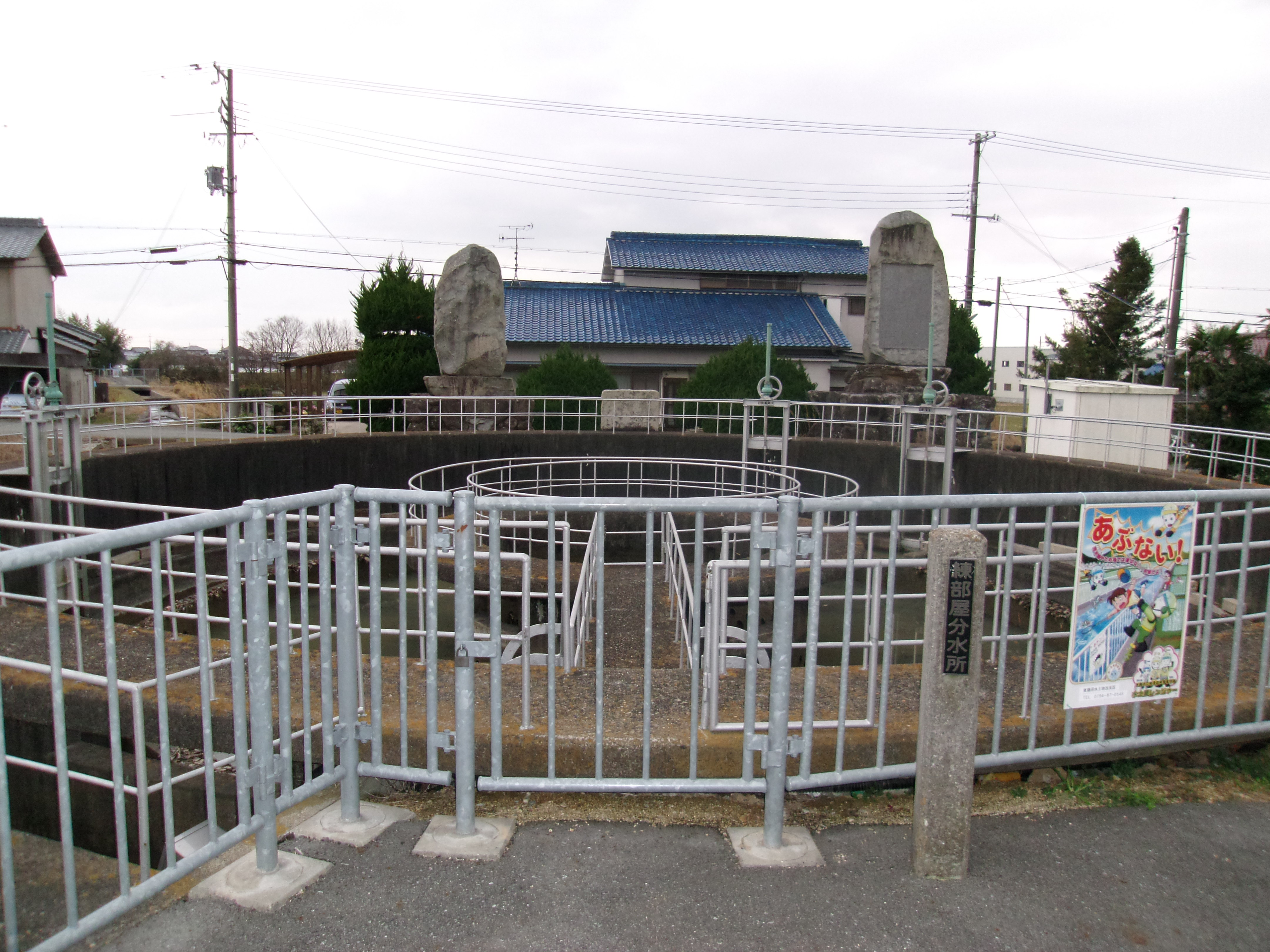 淡河疎水の練部屋分水所